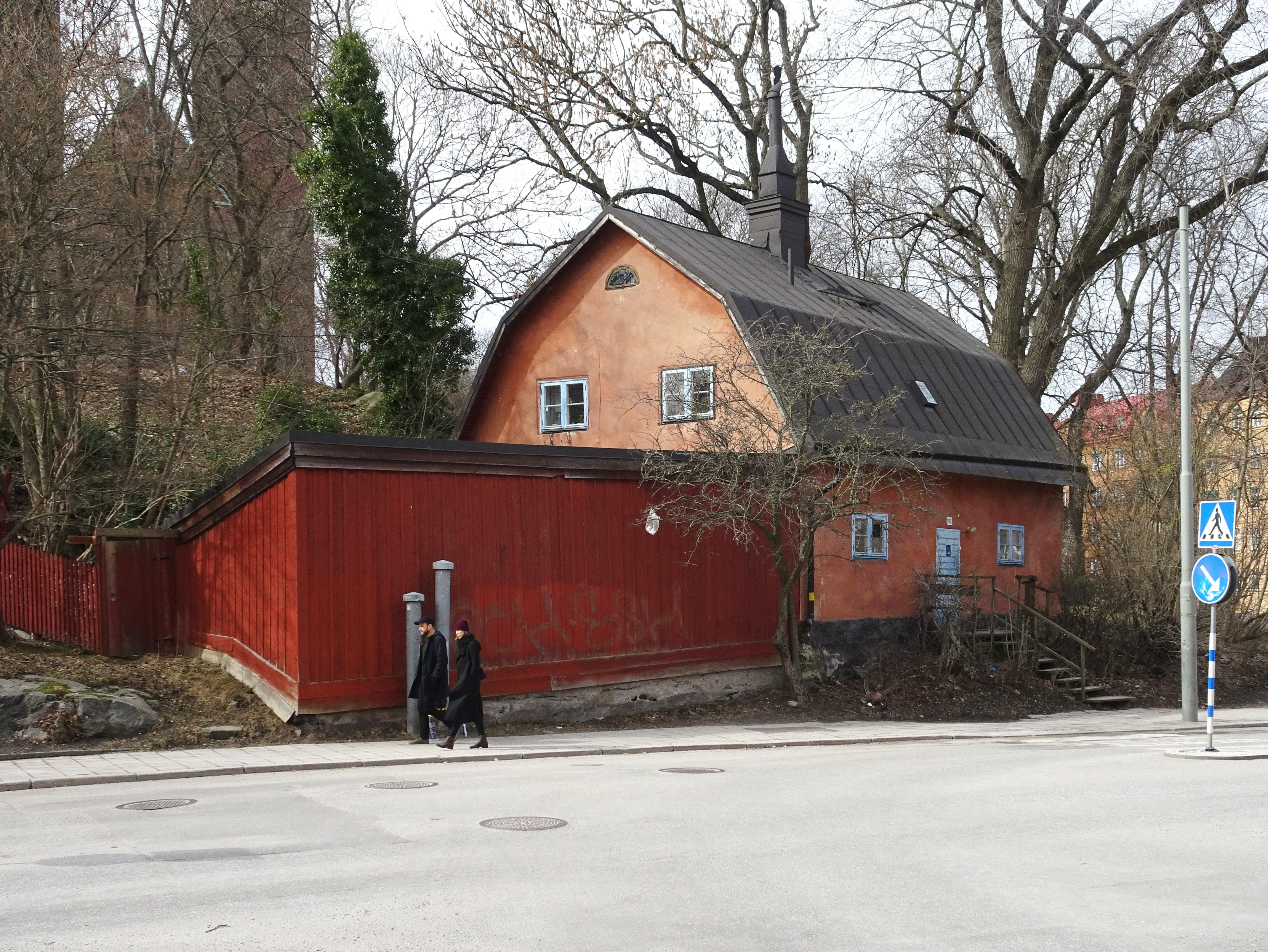 Fastigheten Grindvakten 1, Södermalm, ursprungligen tjänstebostad för portvakten vid malmgården Heleneborg.